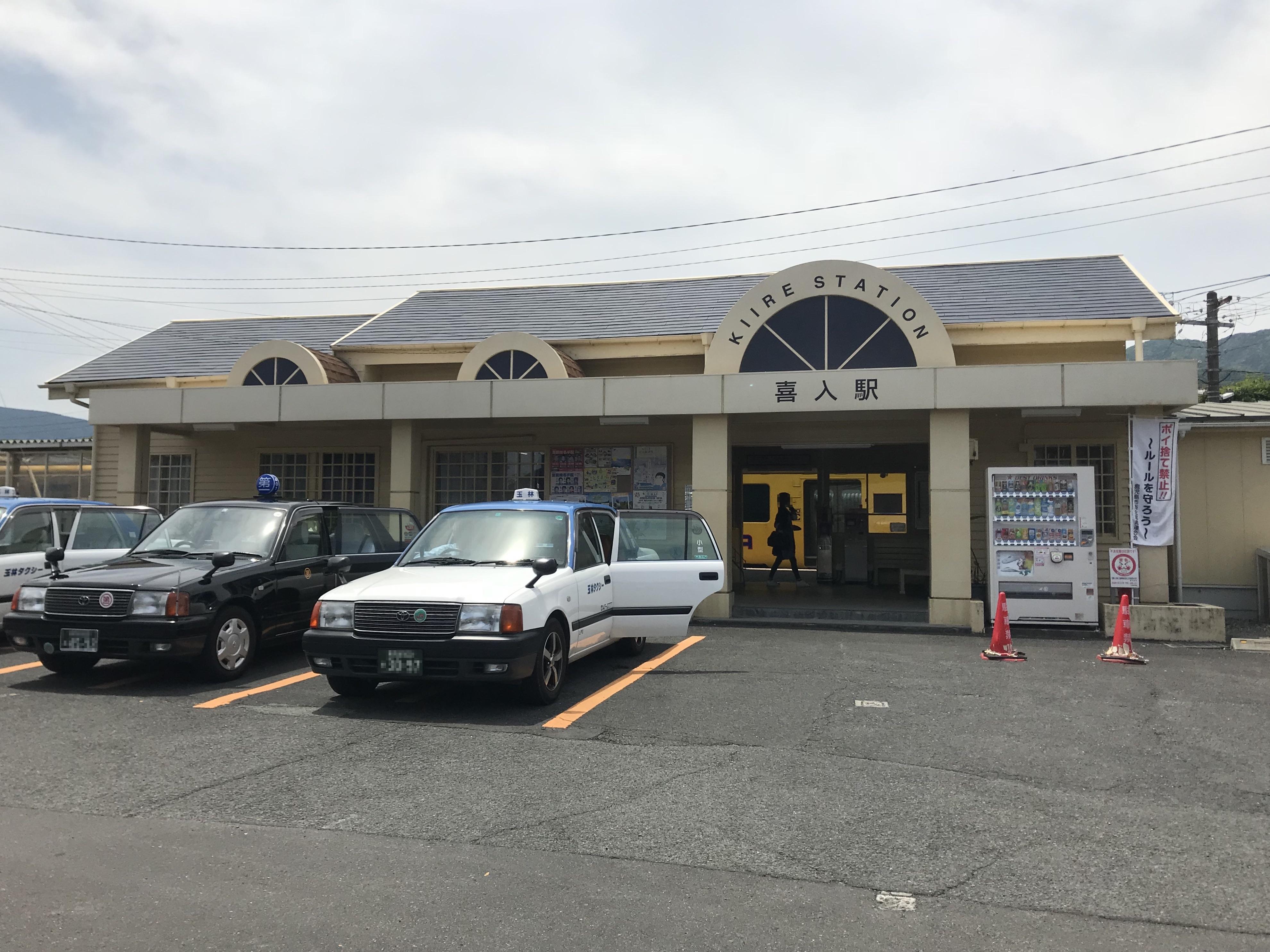 喜入駅の駅舎